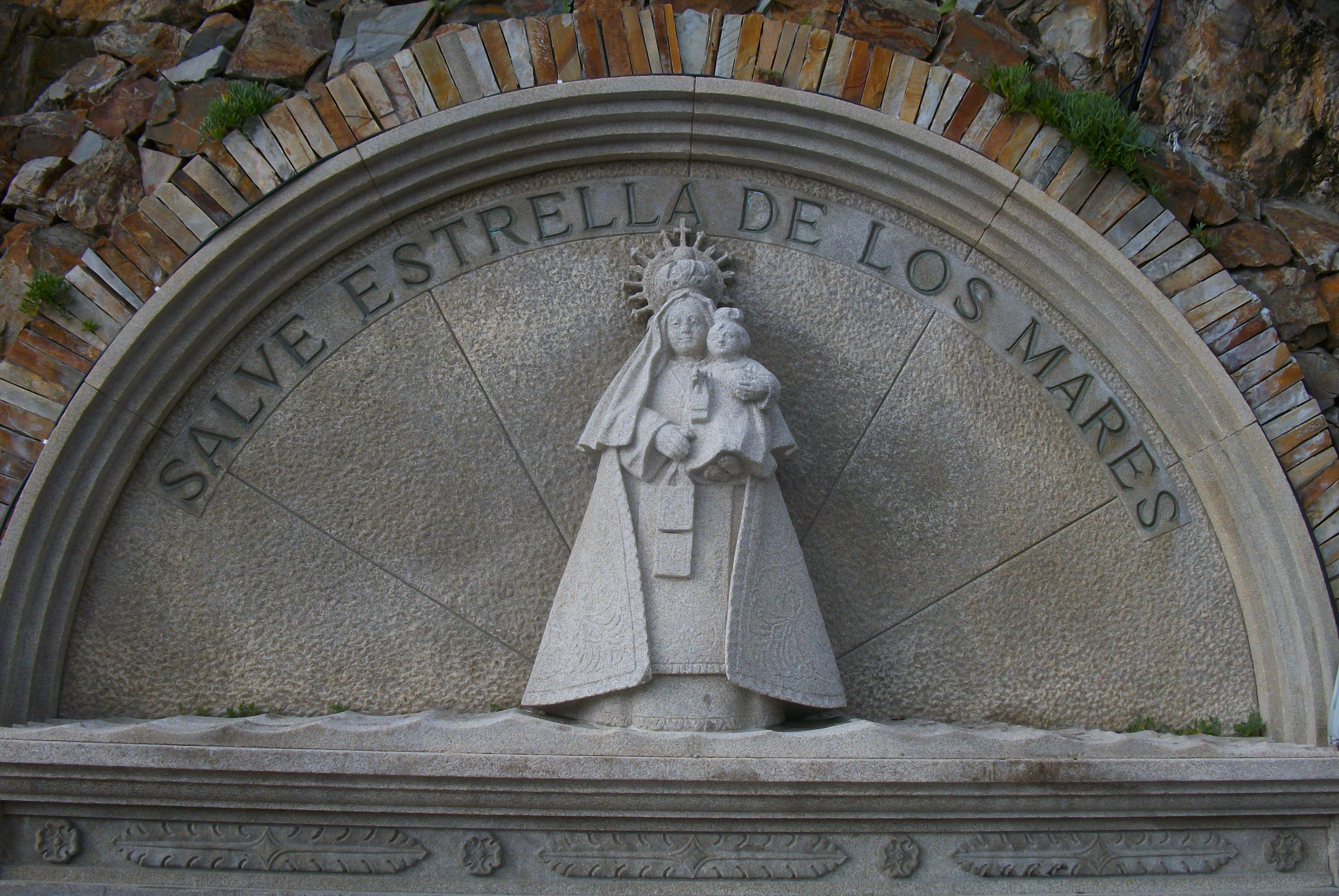 Statue de ND du Mont Carmel sur le port de Tapia de Casariego (Asturie)